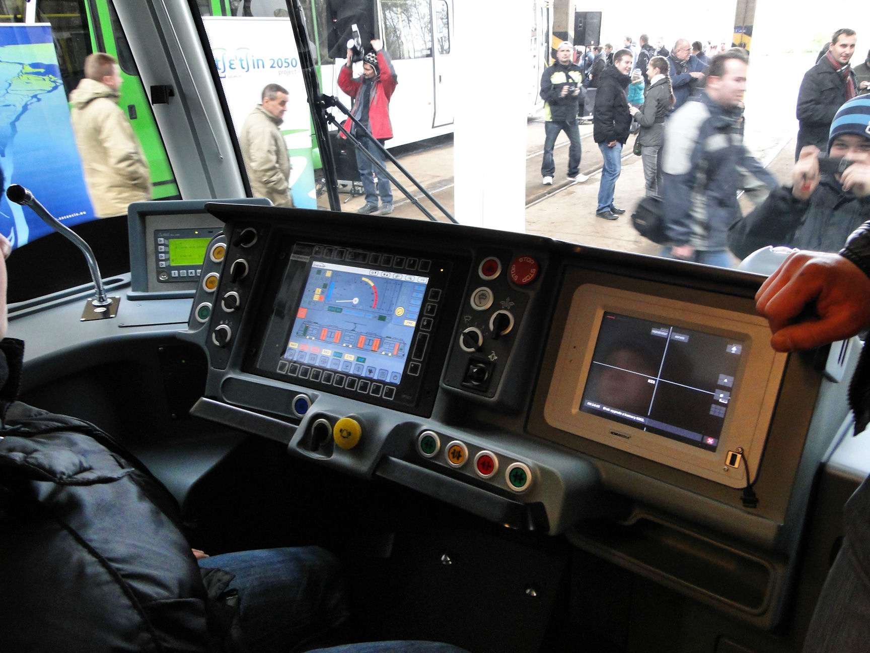 Tramwaj PESA 120Na SWING (wersja dla Szczecina)